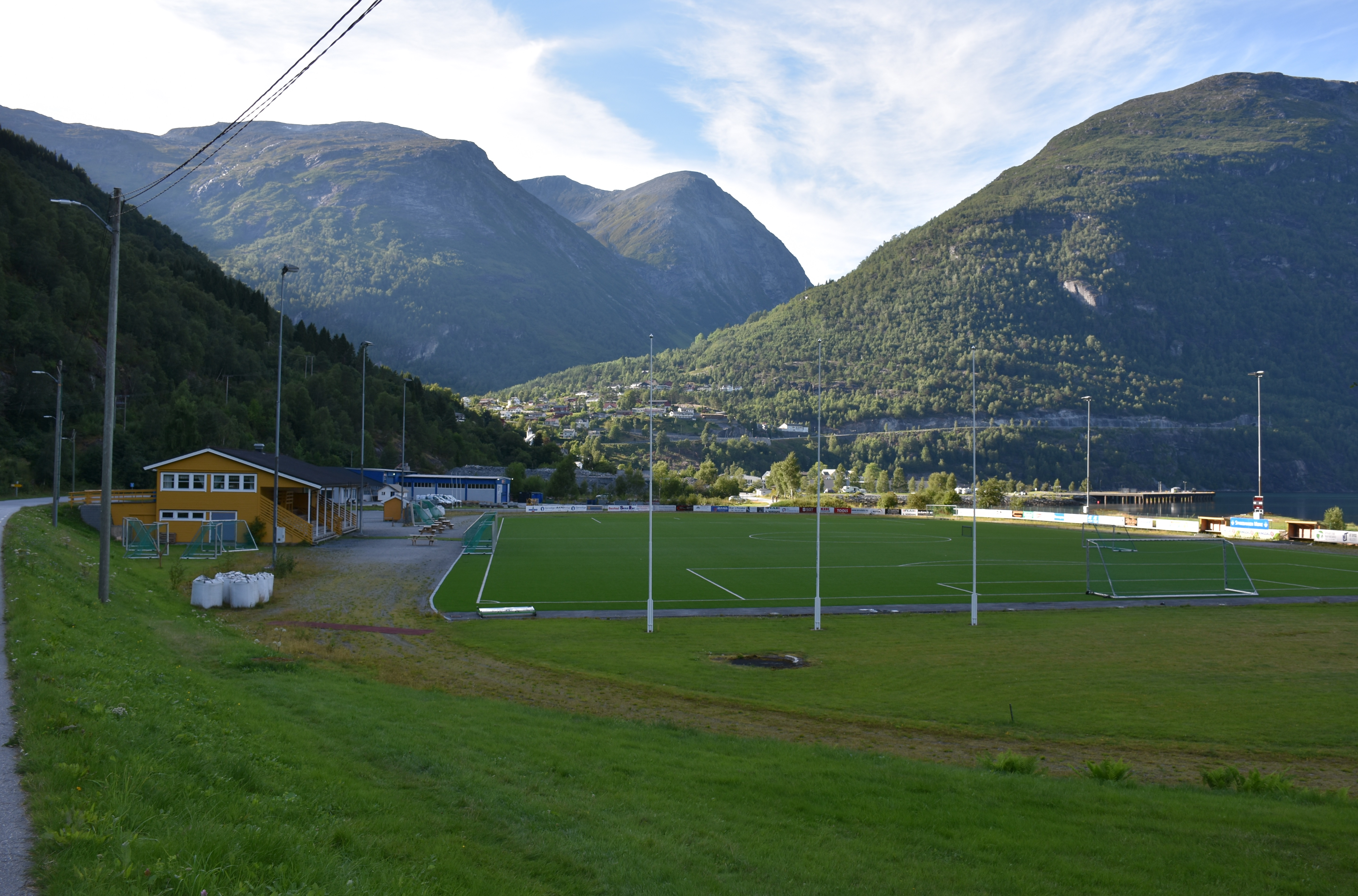 Hellesylt stadion med Bygda (fylkesvei 80) i venstre billedkant